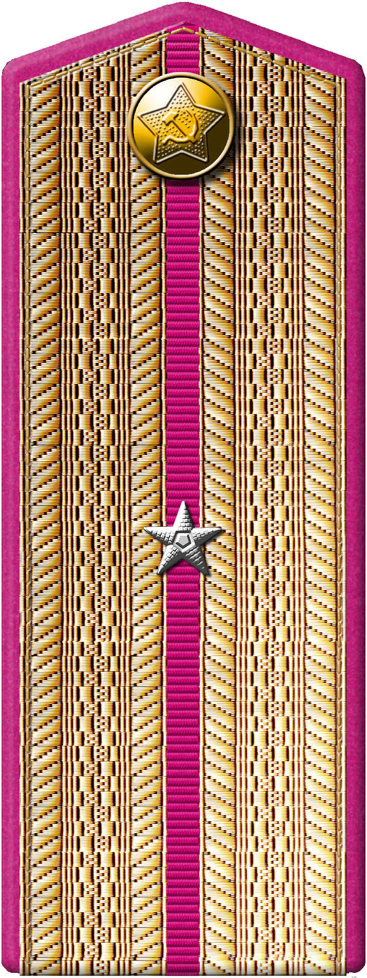 Союз Советских Социалистических Республик/Советский Союз/СССР Вооруженные силы Рабоче-Крестьянская Красная Армия (РККА) Знаки различия образца 1943г., погоны повседневные. Использовались 1943-1947гг. Воинское звание: Младший лейтенант. Первичный источник: Указ Президиума Верховного Совета СССР «О введении погон для личного состава Красной армии» от 6 января 1943г., объявленный Приказом Народного Комиссара обороны СССР № 24 от 10 января 1943 г. Приказ Народного Комиссара обороны СССР № 25 от 15 января 1943 г .«О введении новых знаков различия и об изменениях в форме одежды Красной Армии» Вторичный источник: Харитонов О.В. Иллюстрированное описание обмундирования и знаков различия Советской Армии (1918–1958), АИМ, Л., 1960.